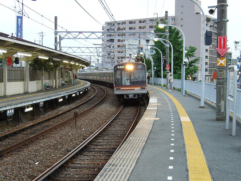 阪急千里線豊津駅 北千里行きホームに大阪市交66系が進入